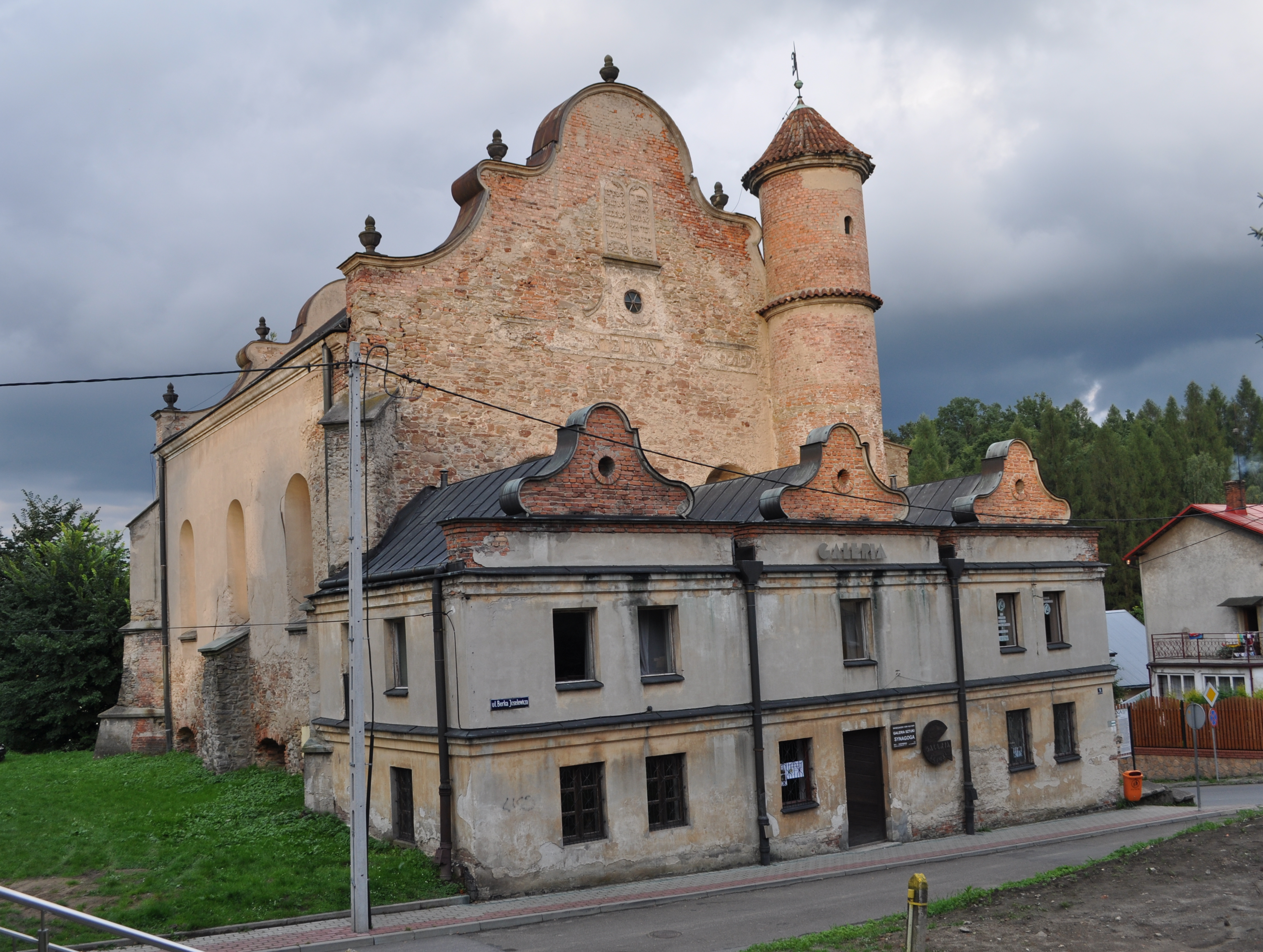 Synagoga w Lesku